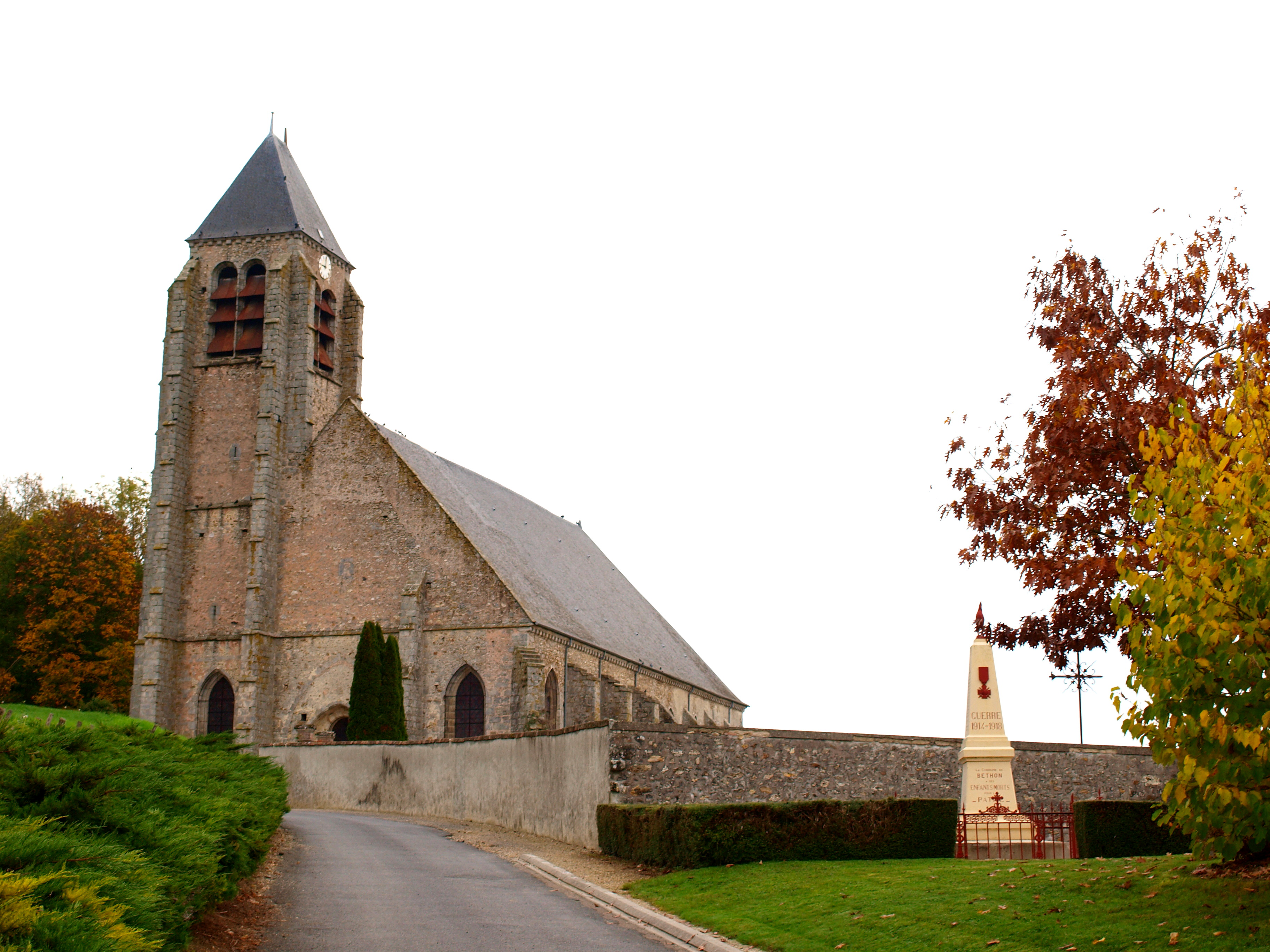 Bethon (Aisne, France) ; église